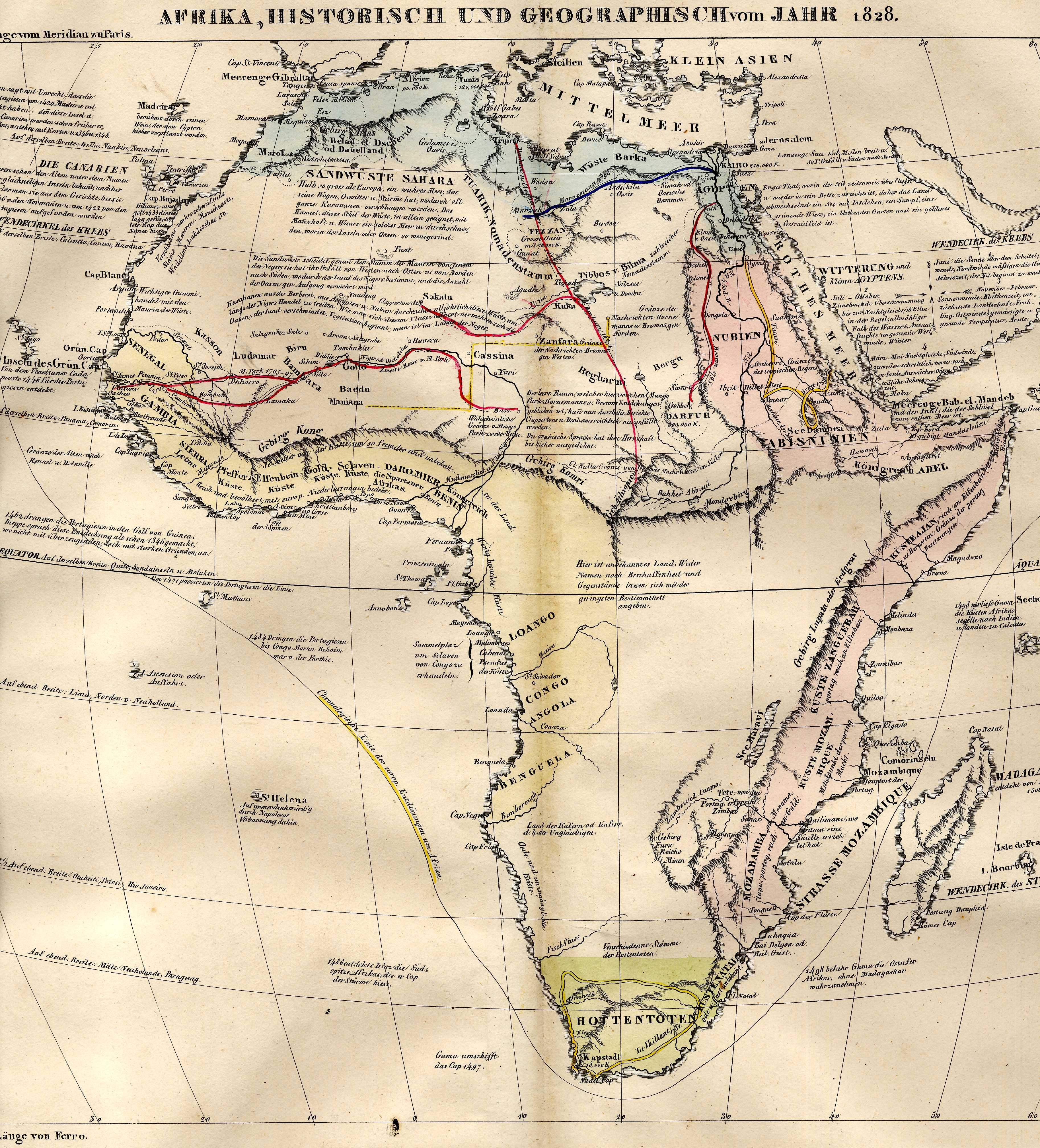 Afrika, Historisch und Geographisch vom Jahr 1828